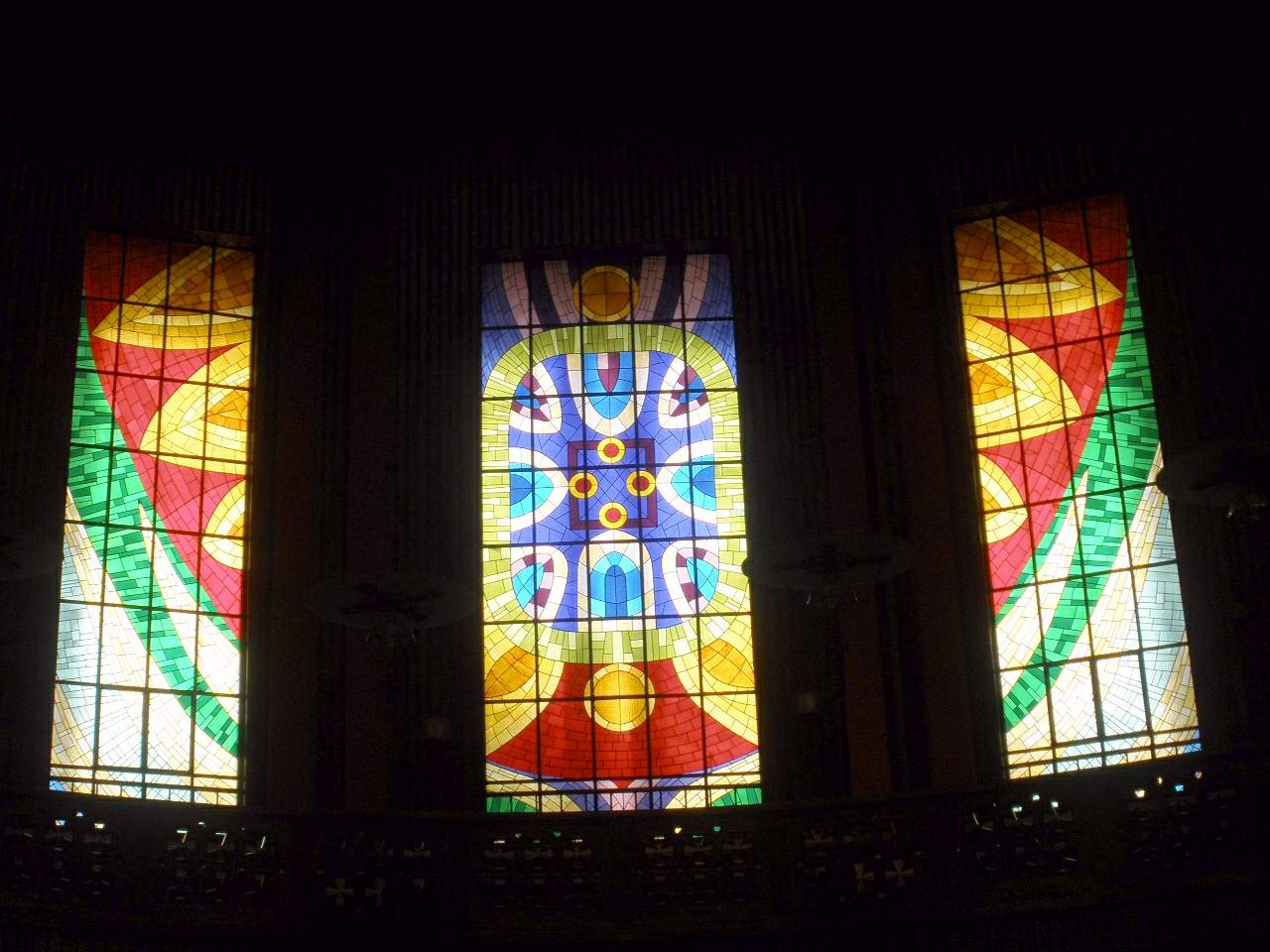 Iglesia del Inmaculado Corazón de María, en Oviedo